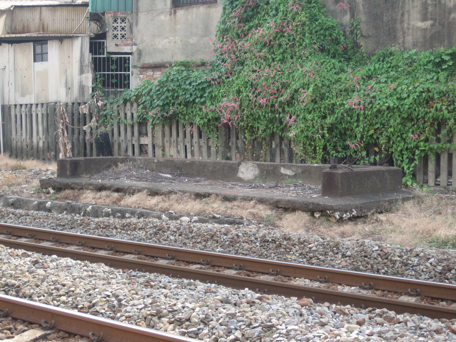 位在臺南市東區的東門車站，已廢站，今只存月臺遺跡。